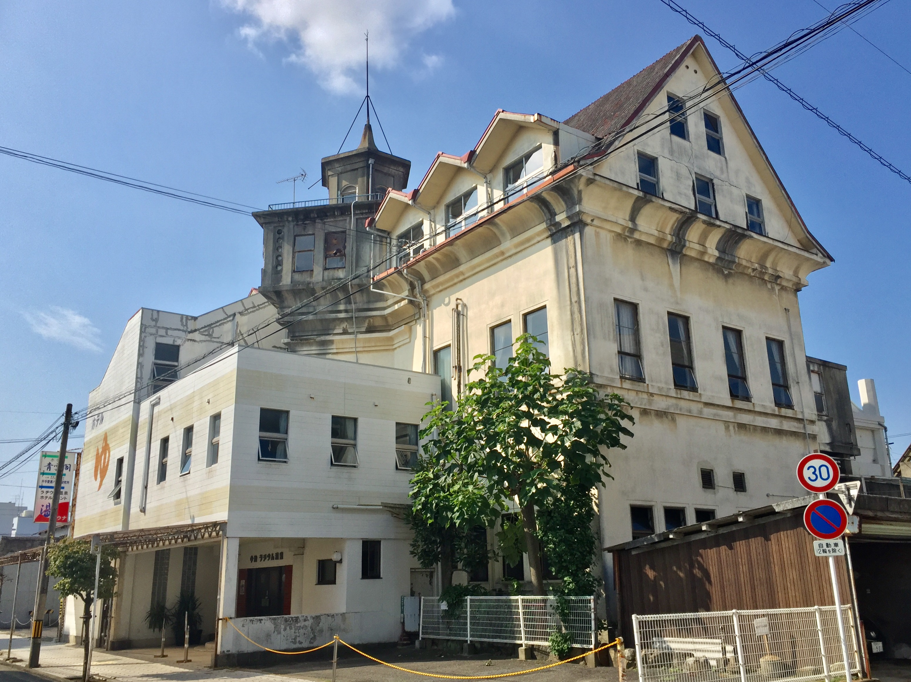 今治ラジウム温泉の外観（北東側より撮影）。